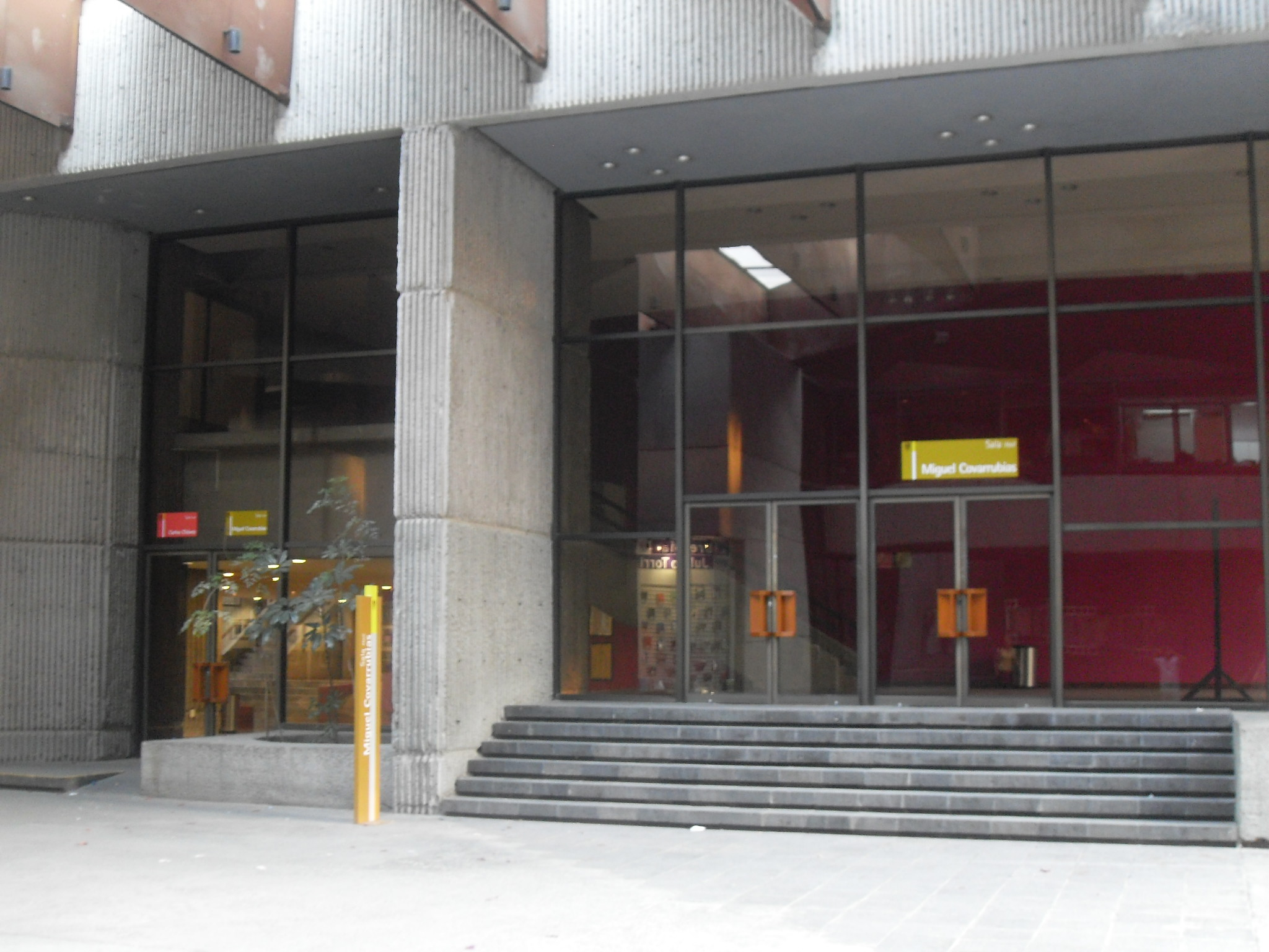 Salas Miguel Covarrubias y Carlos Chavez